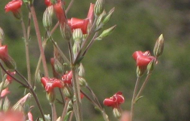 Viviania marifolia Cav., "te de burro", 1200 masl, Matorral Central Chile